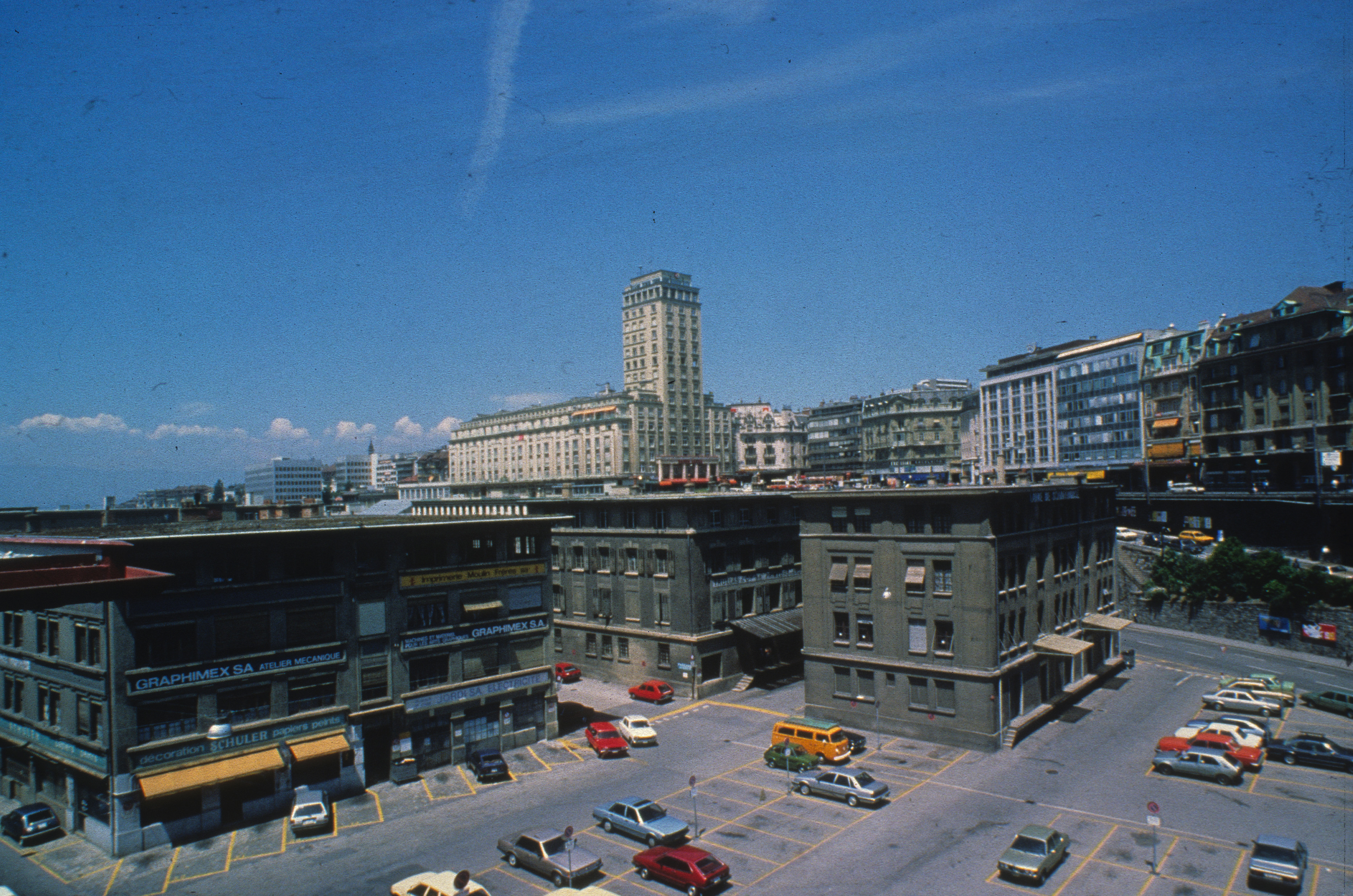 Vue de la plateforme du Flon depuis le Sud- Est. En permier plan la place de l'Europe, l'entrée de la plateforme sur la Voie-du-Chariot et en arrière-plan la tour Bel-Air.